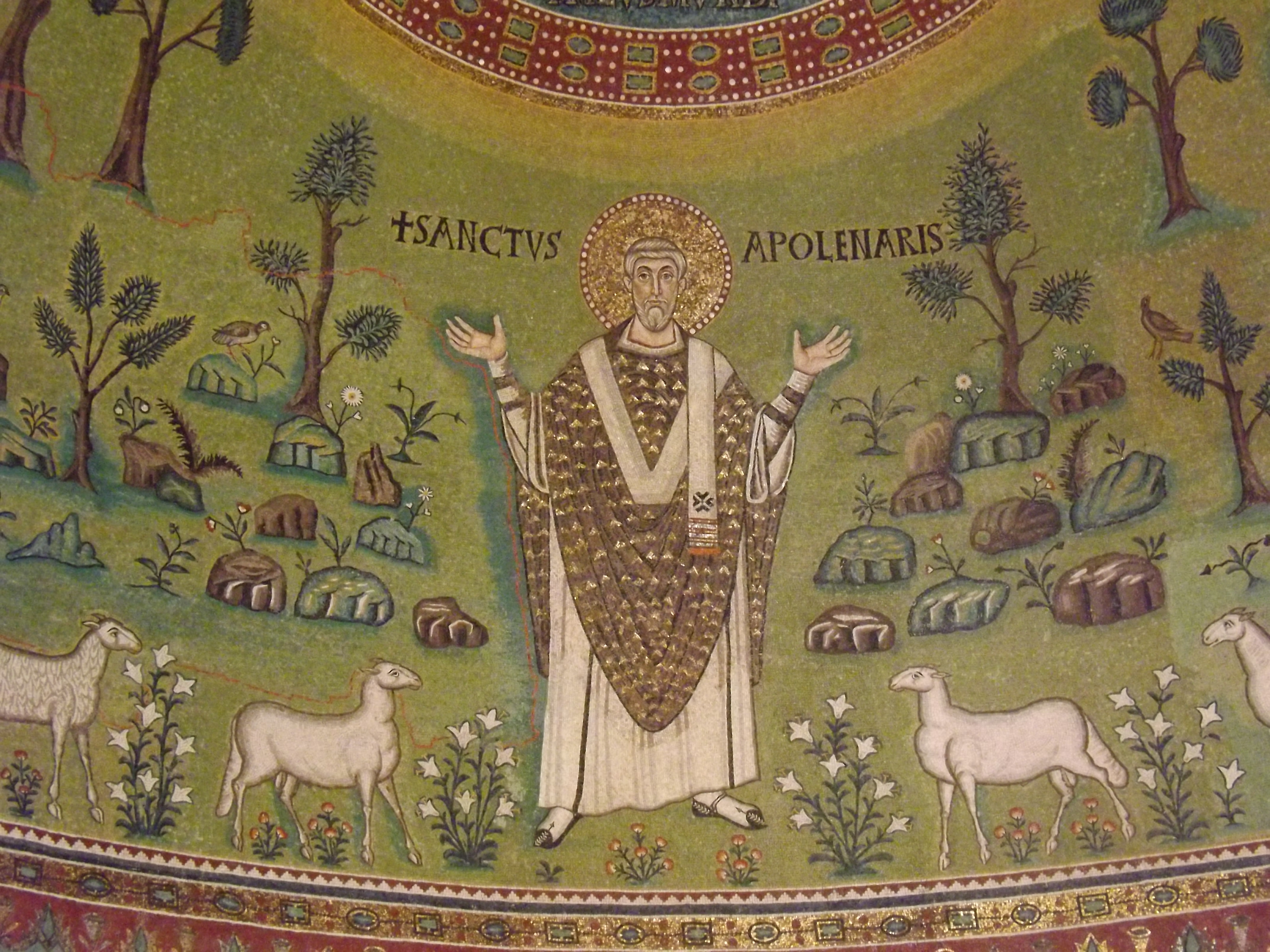 Basilica di Sant'Apollinare in Classe This is a photo of a monument which is part of cultural heritage of Italy.